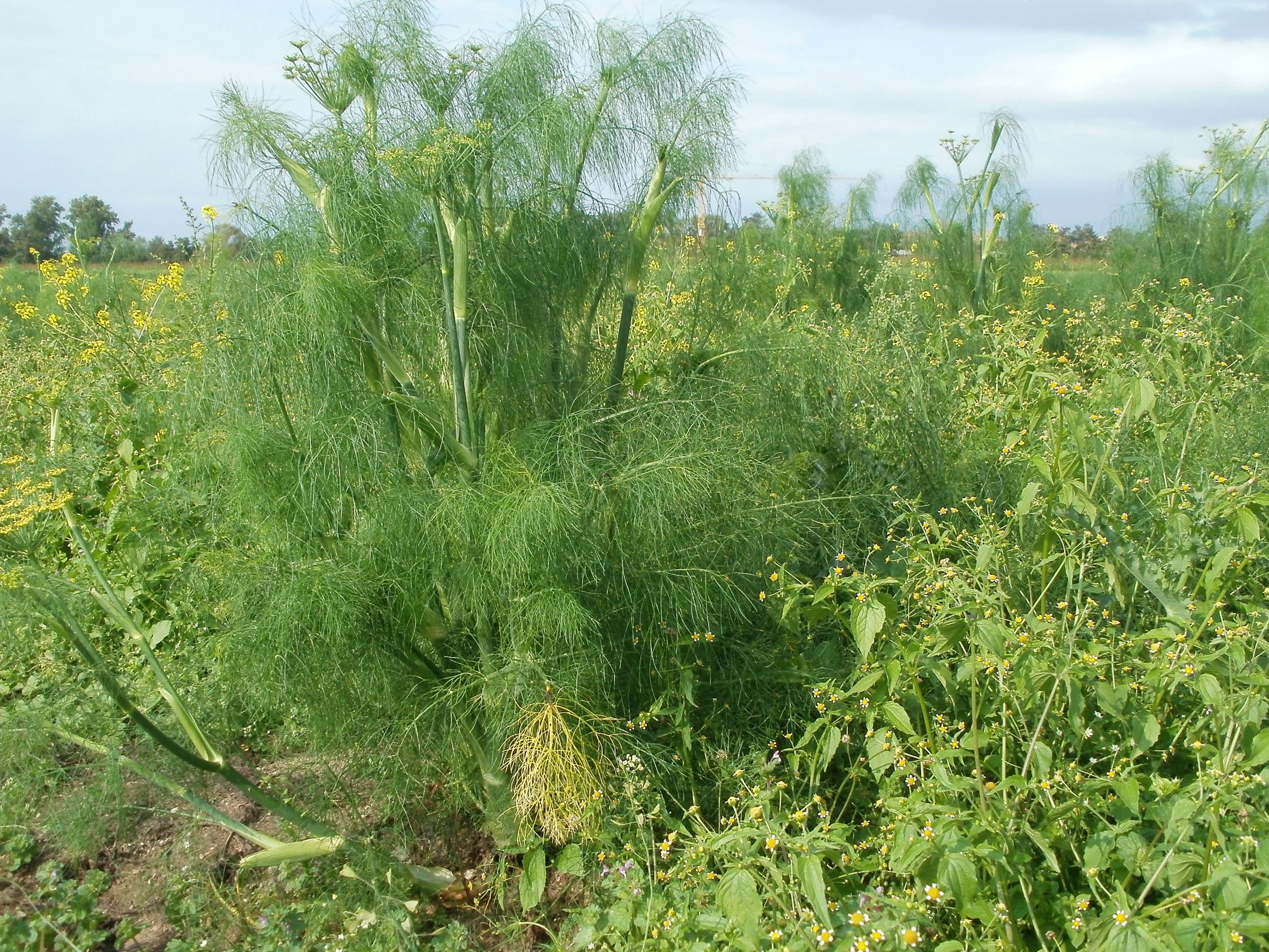 Fenchelfeld bei Neulußheim